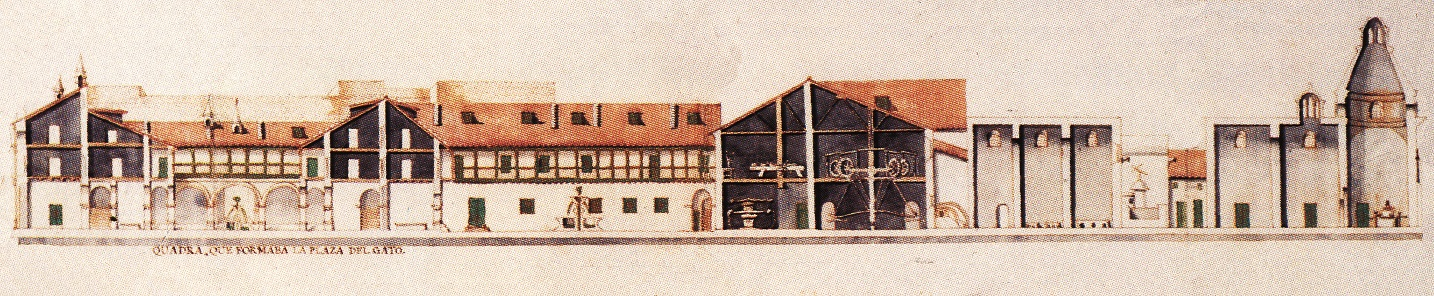 Detalle de plano de la Real Casa de Moneda, 1772